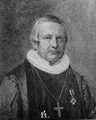 Jørgen Johan Tandberg, norwegian bishop (1816-84)